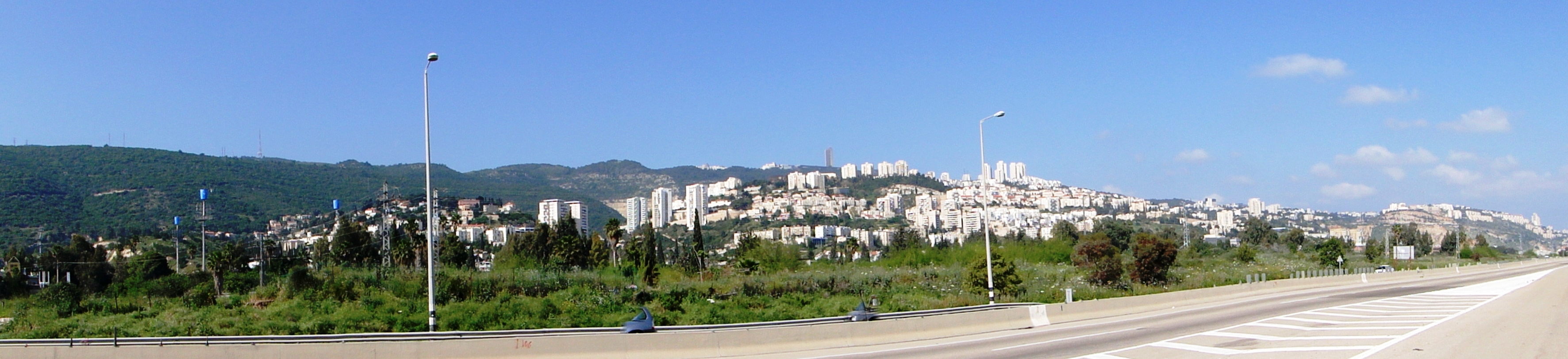 Nesher – Panoramic view, The city Nesher in Israel תמונה פנורמית של העיר נשר ושכונותיה השונות. משמאל גבעת נשר במרכז תל חנן למטה ורמות יצחק מעליה מימיו גבעת עמוס ובן דור. ניתן לראות גם את מגדל האוניברסיטה